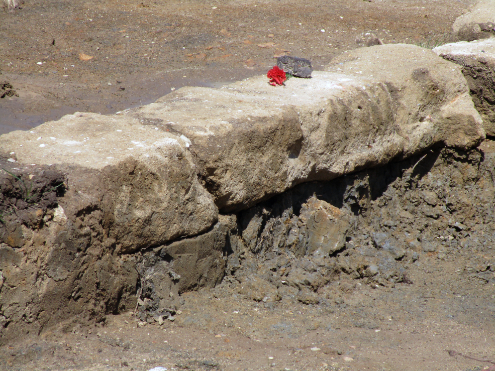 KZ-Außenlager Laagberg, einzelne Fundamentsteine der KZ-Baracke Block 4